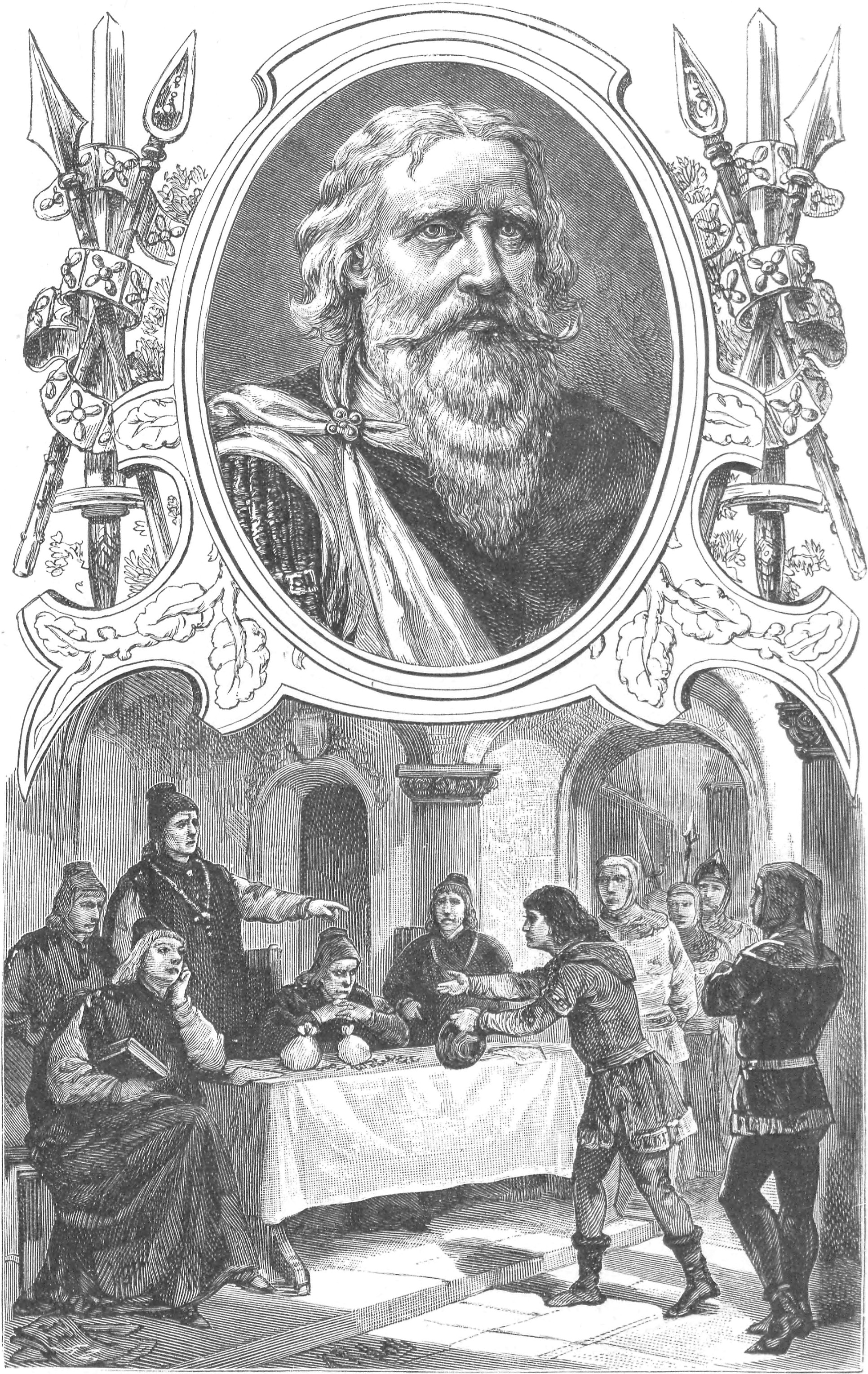 ilustracja z książki „Wizerunki książąt i królów polskich“